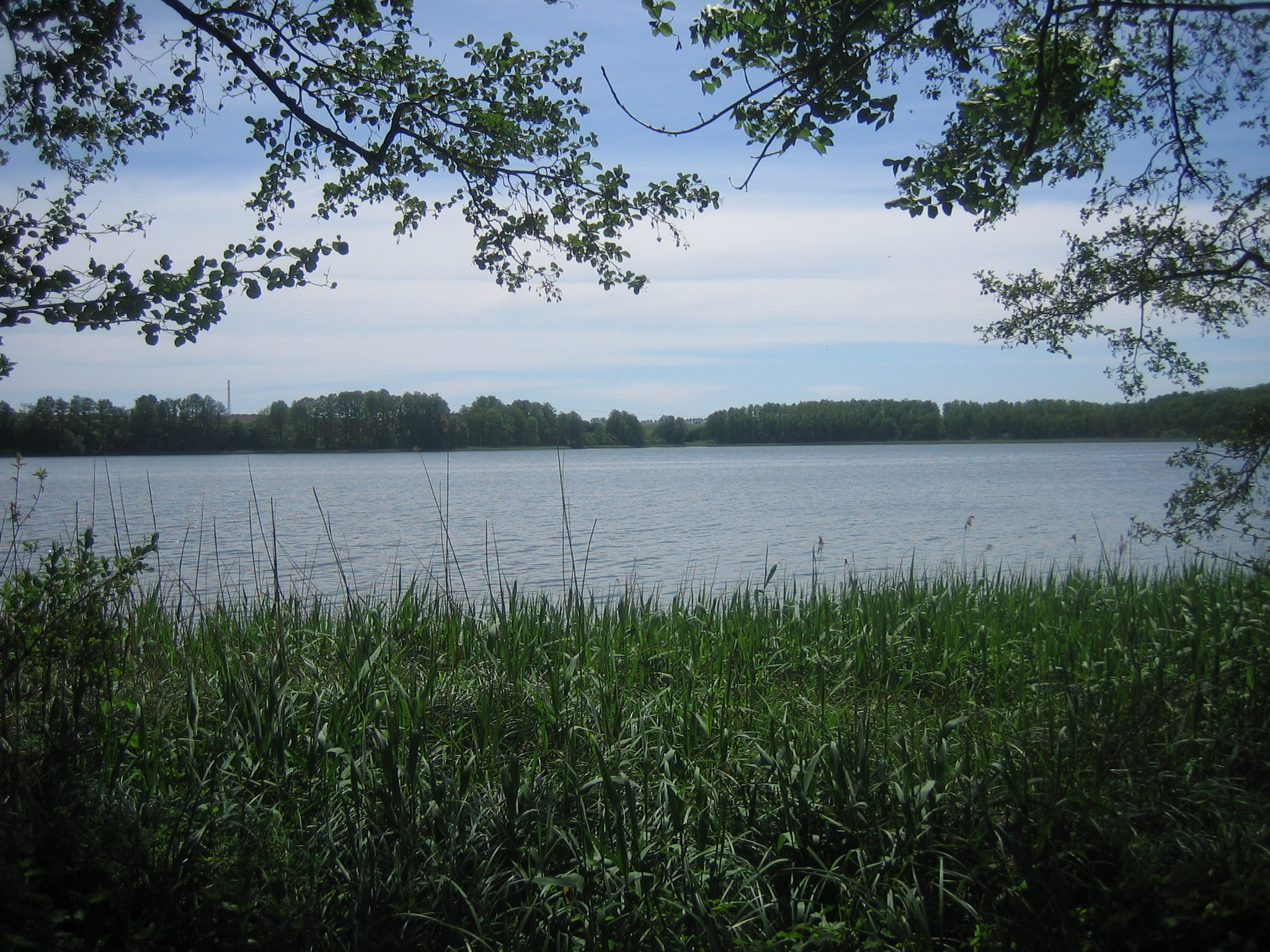 Camminer See, Landkreis Mecklenburgische Seenplatte